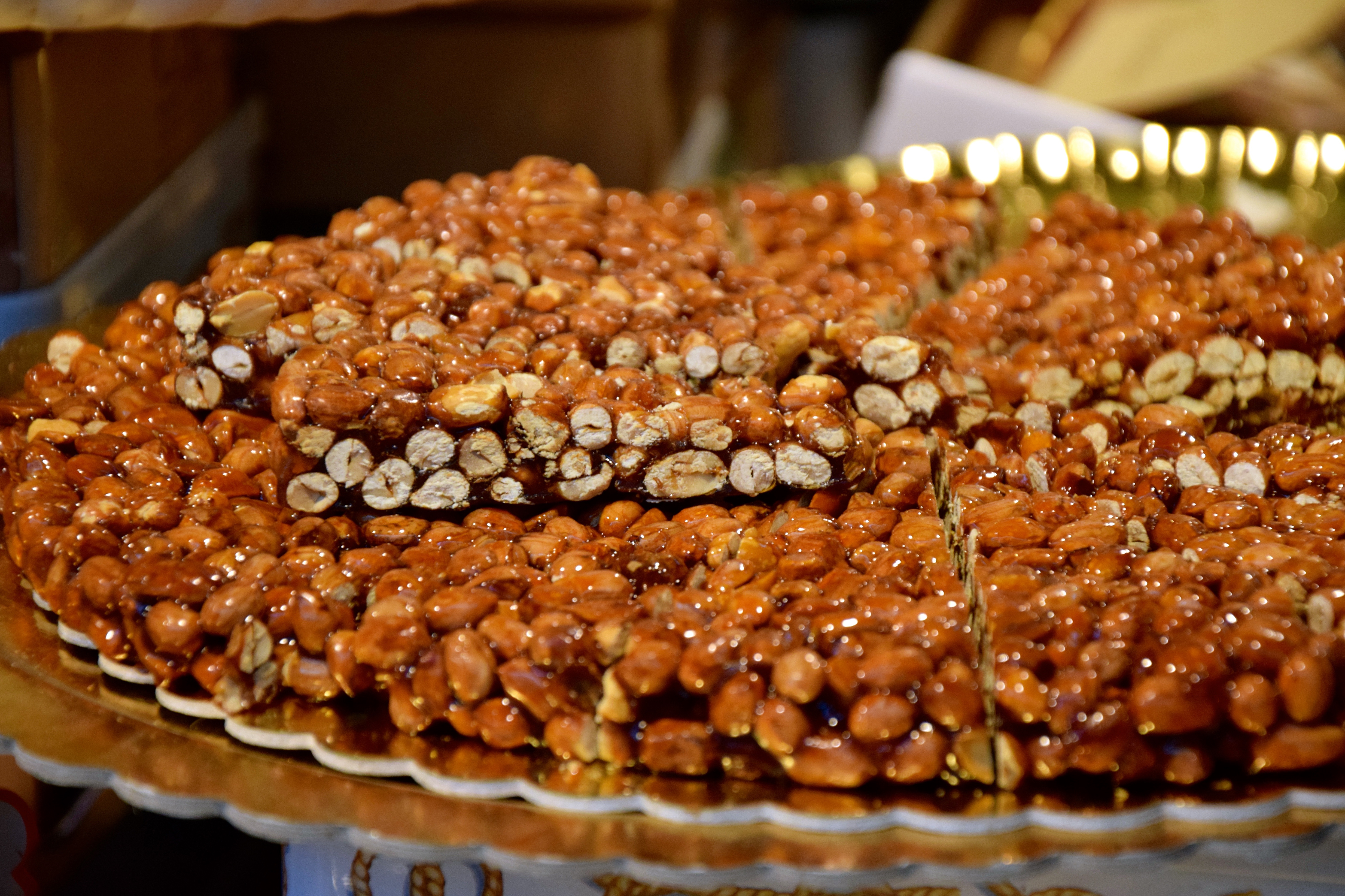 Copenhagen, Denmark